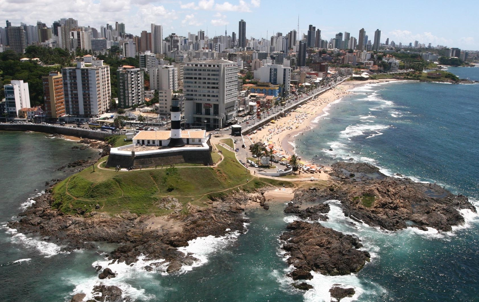 Imagem aérea do Farol da Barra, em Salvador, Bahia, Brasil.